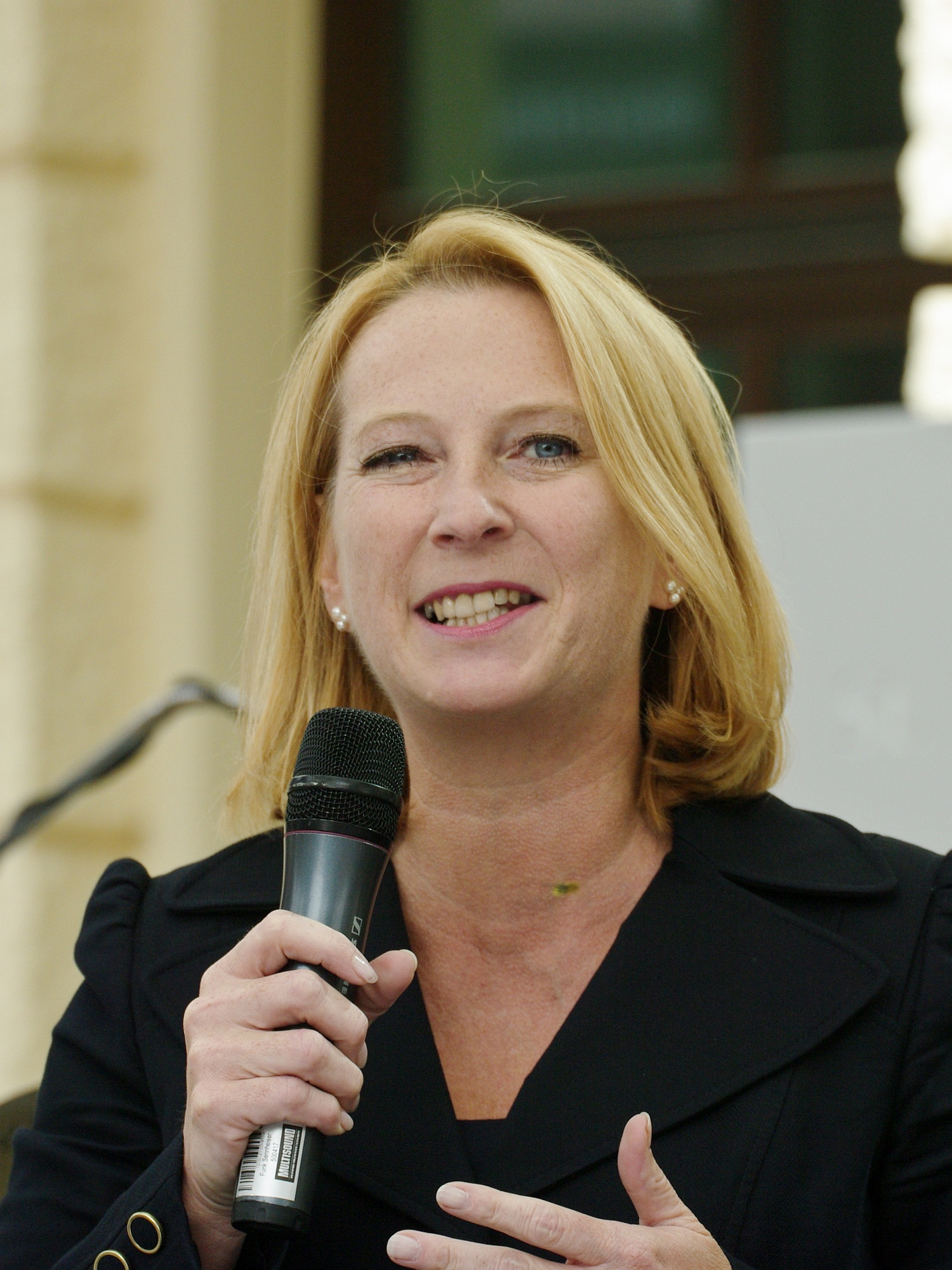 Doris Bures, Bundesministerin für Verkehr, Innovation und Technologie, während der Eröffnungsfeier des neuen Hauptbahnhofes in St. Pölten am 10. September 2010